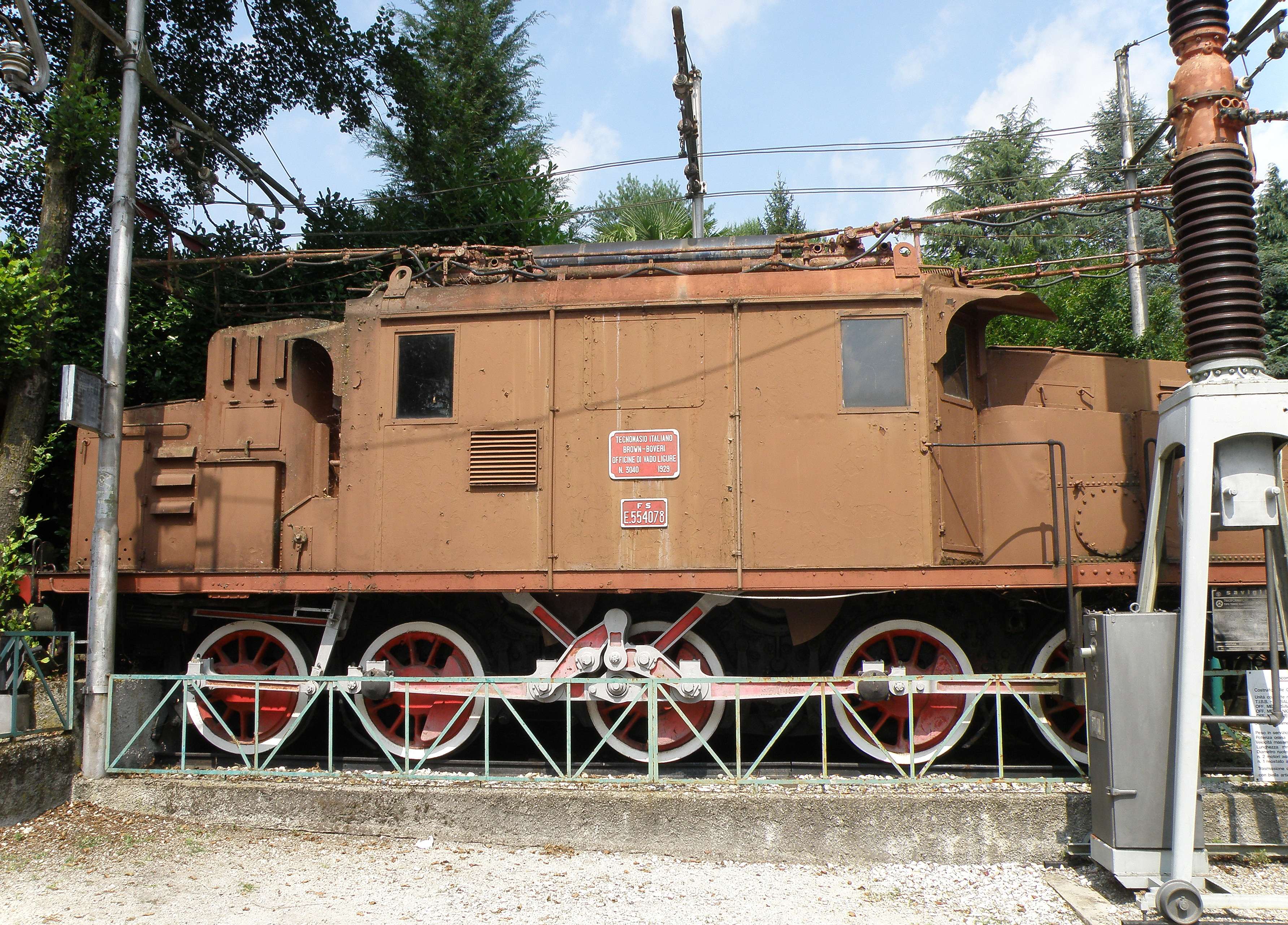 Locomotiva elettrica trifase E.554.078 delle Ferrovie dello Stato, conservata al Museo dei Trasporti Ogliari di Ranco.